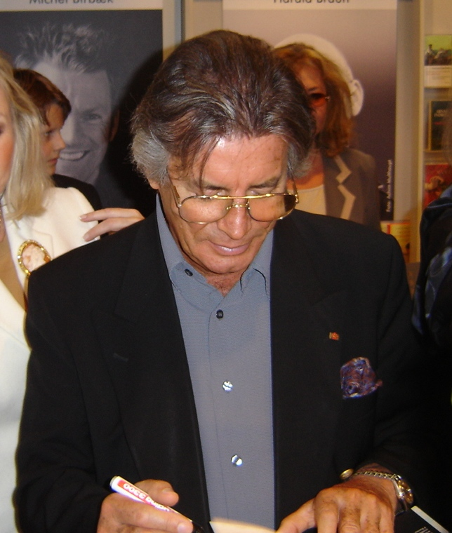 Pierre Brice Fotograf: Florian K Datum: 9. Oktober 2004 Ort: Buchmesse Frankfurt am Main